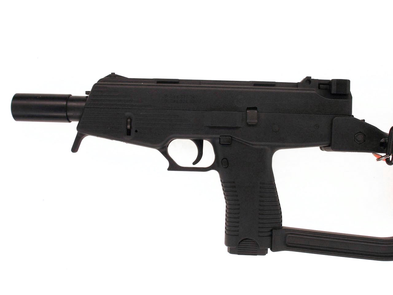 Steyr SPP 9mmPara